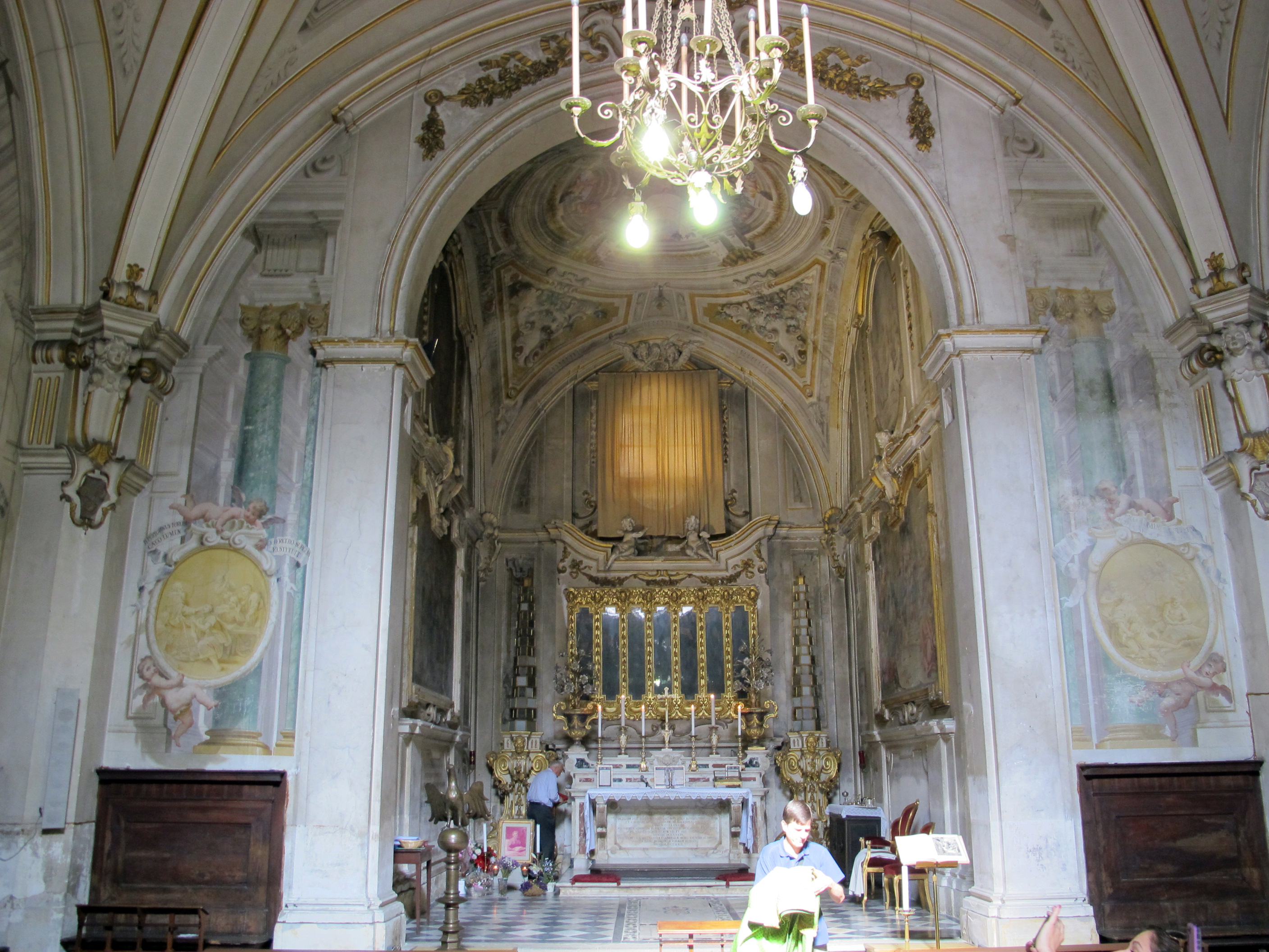 Capitolo della ss. annunziata